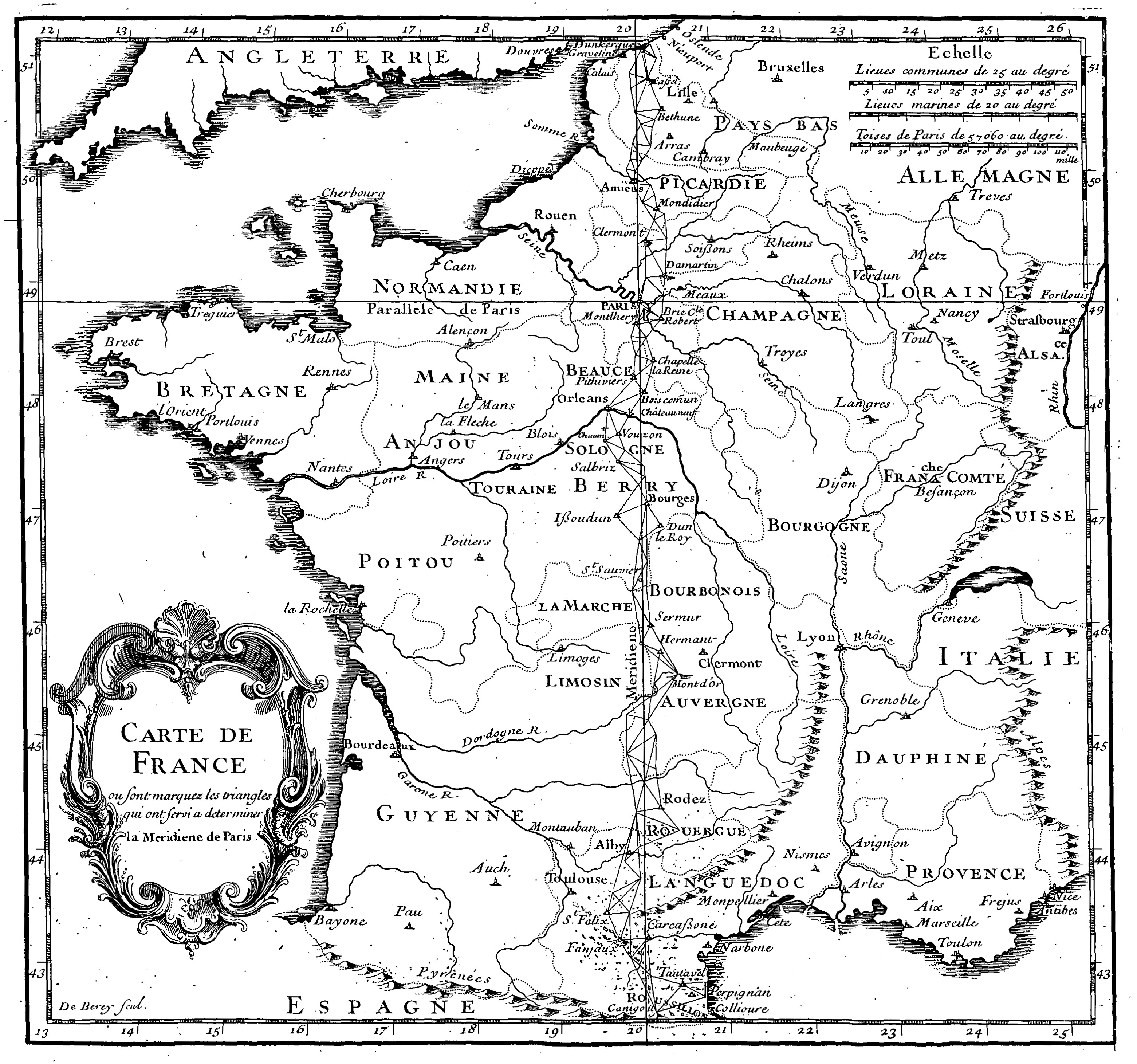 Méridienne de Paris, travail des Cassini (J-Dominique et Jacques), illustration extraite de la publication De la grandeur et de la figure de la Terre de Jacques Cassini